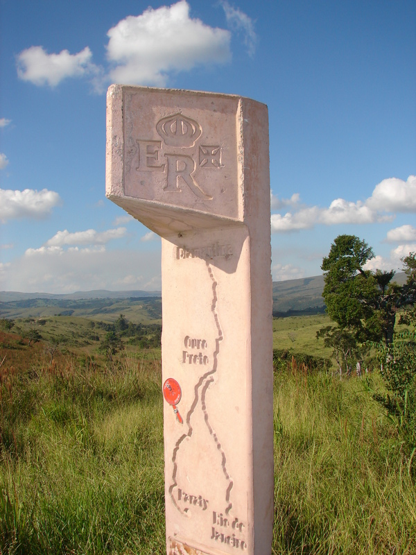 Estrada Real se refere aos caminhos trilhados pelos colonizadores desde a descoberta do ouro em Minas Gerais até o período de sua exaustão. Um passeio nessa estrada é um retorno a história, é voltar no tempo dos tropeiros que chegavam em seus cavalos e adultos e crianças faziam festa com a chegada da tropeirada. Passa por Minas Gerais, São Paulo e Rio de Janeiro.